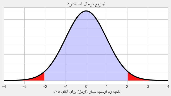 اگر سطح خطای معنی (آلفا) برابر ۰/۰۵ باشد. در صورتی فرضیه‌ صفر را رد می‌کنیم که عدد z ای که به‌دست آورده‌ایم در ناحیه‌ی قرمز باشد